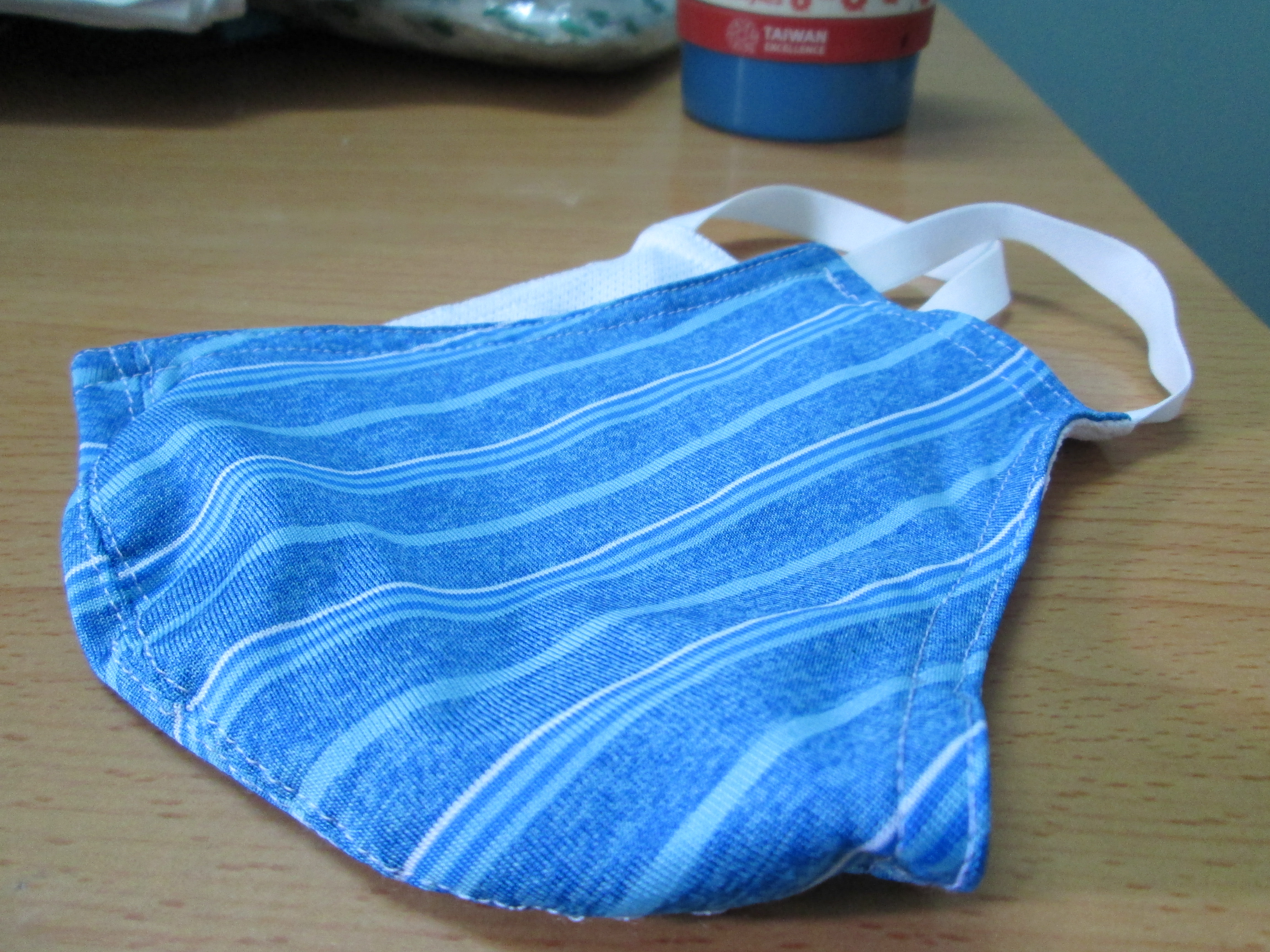 Khẩu trang được may bằng vải